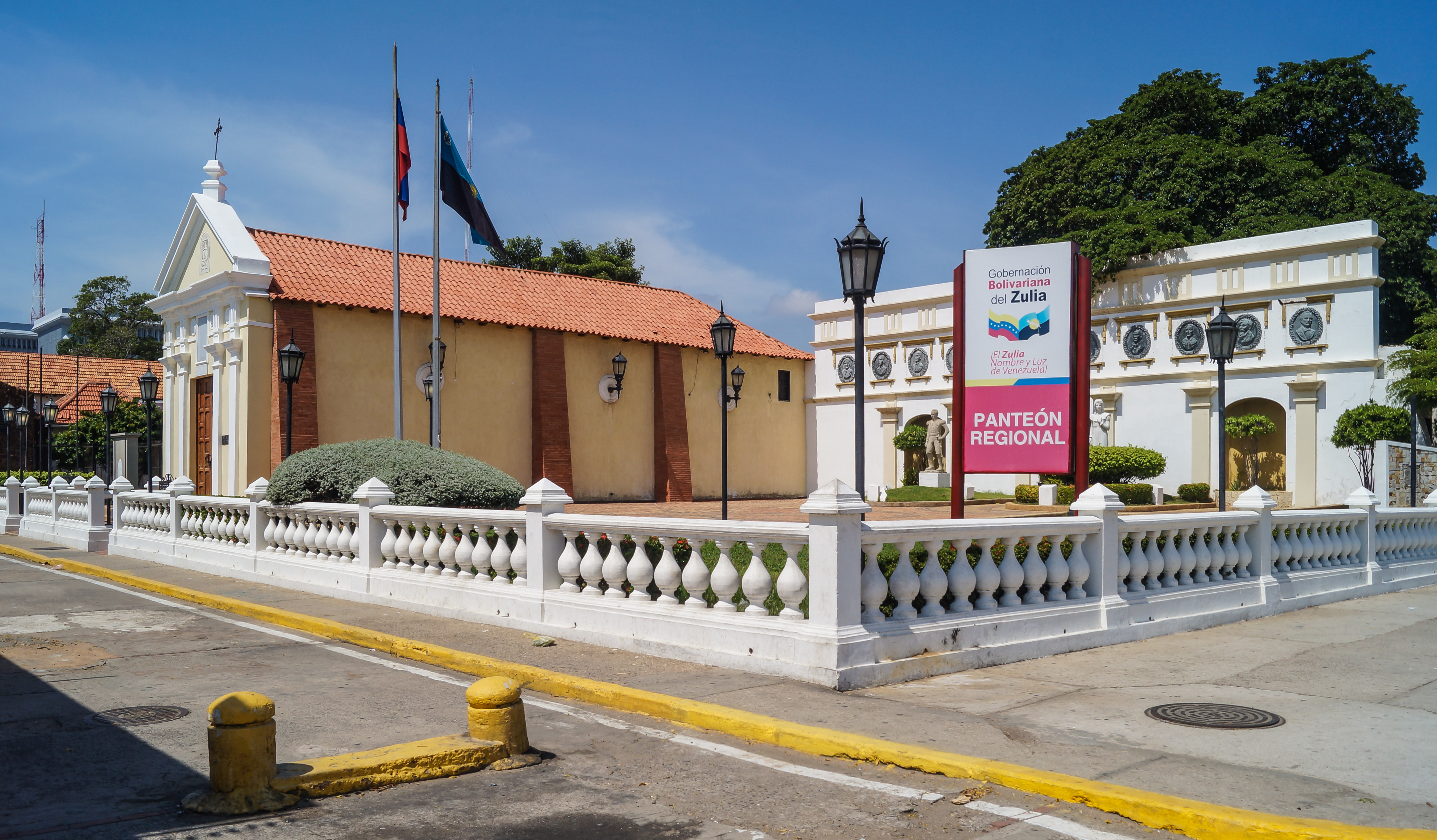 El Panteón Regional: su funcionamiento se remonta a 1988. Antiguamente era la capilla de Nuestra Señora de Coromoto, y en él tienen sus última morada los hombres y ujeres ilustres que con su trabajo han forjado el estado Zulia, como próceres de la Independencia, músicos, poetas, escritores, entre otros y la Plaza de la Herencia, se encuentra al lado del Panteón Regional. Posee dos escultura, una con la figura del General Rafaqel Urdaneta y la otra María de los Dolores Vargas, esposa del general. Al fondo se visualiza un muro alto conmemorativo con ventanas arcos y pilastras. El borde superior tiene once medallones que representan a los hijos del general Rafael Urdaneta. Maracaibo